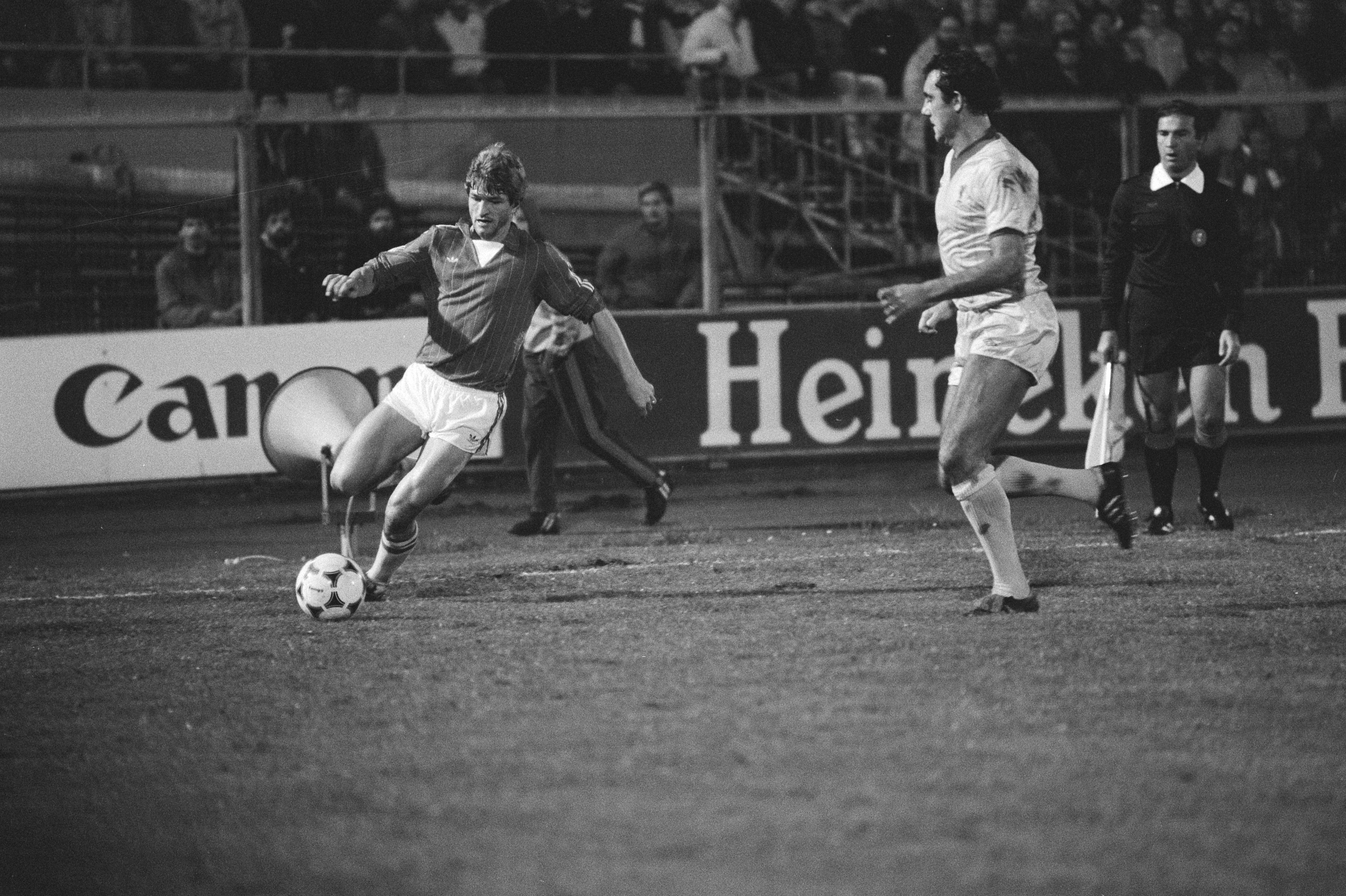 Collectie / Archief : Fotocollectie Anefo Reportage / Serie : Voetbal AZ'67 tegen Liverpool FC 2-2 Beschrijving : Jan Peters in aktie Annotatie : De wedstrijd werd gespeeld in het Olympisch Stadion te Amsterdam. Rechts Ray Kennedy? Datum : 21 oktober 1981 Locatie : Amsterdam Trefwoorden : sport, voetballen Persoonsnaam : Peters, Jan Fotograaf : Dijk, Hans van / Anefo Auteursrechthebbende : Nationaal Archief Materiaalsoort : Negatief (zwart/wit) Nummer archiefinventaris : bekijk toegang 2.24.01.05 Bestanddeelnummer : 931-7562